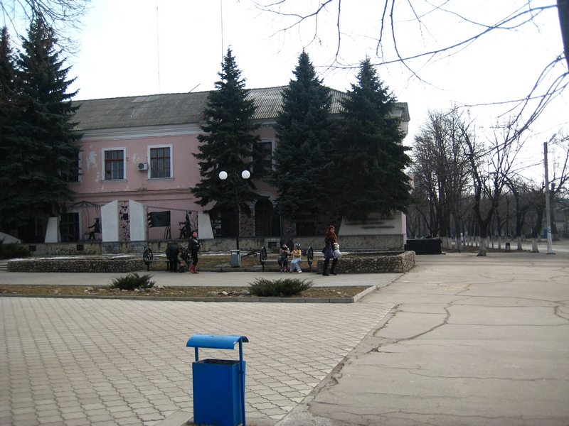 Музей под открытым небом